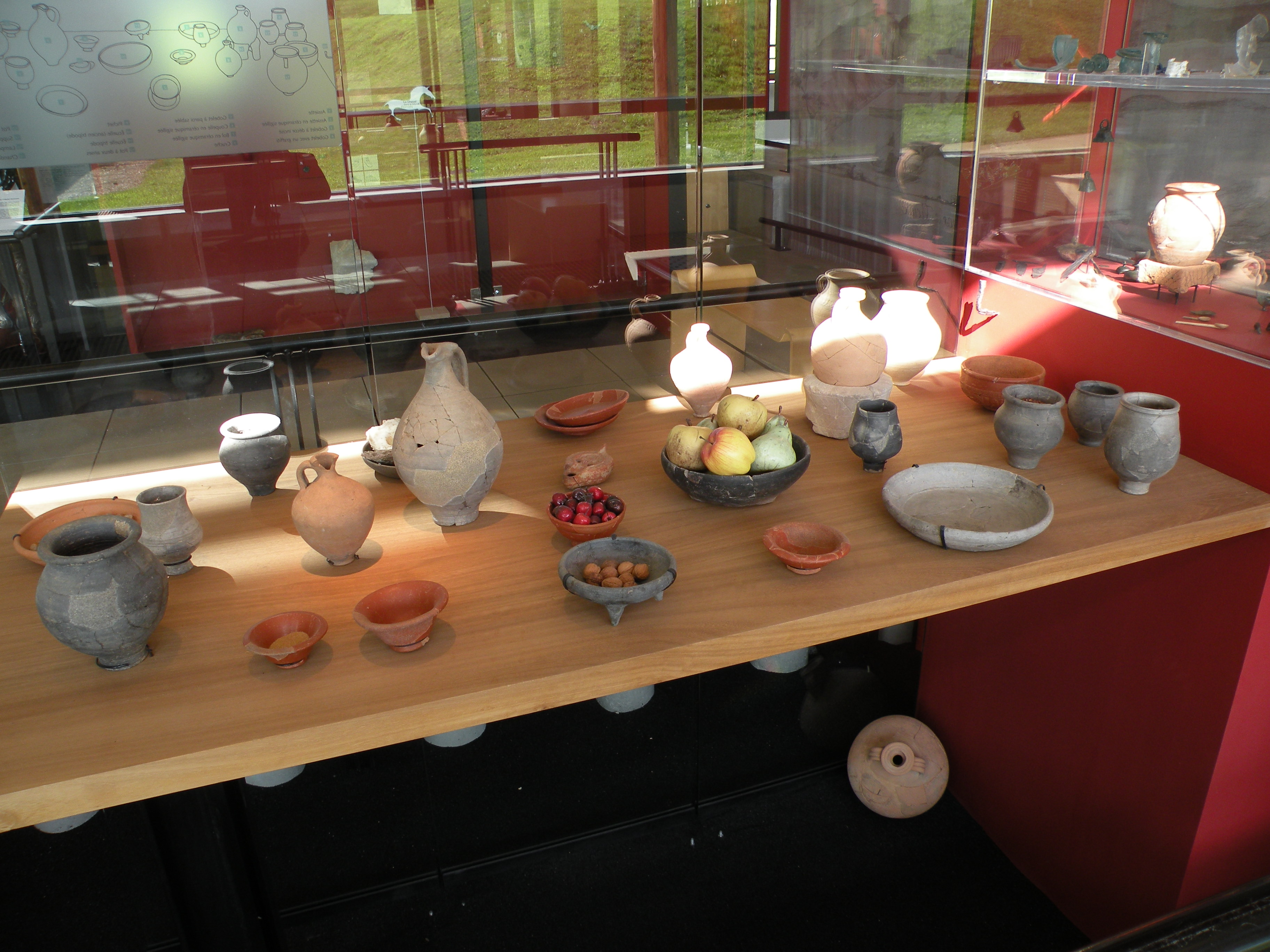 Table d'époque romaine au musée archéologique de Vieux-la-Romaine (Calvados, Normandie, France).